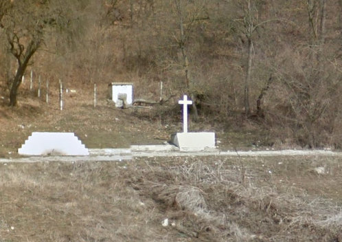 Стар паметник на загиналите на 21 юни 1774 г. руски войни в Руско-турската война 1768-1774 г. при с. Козлуджа (днес Суворово)